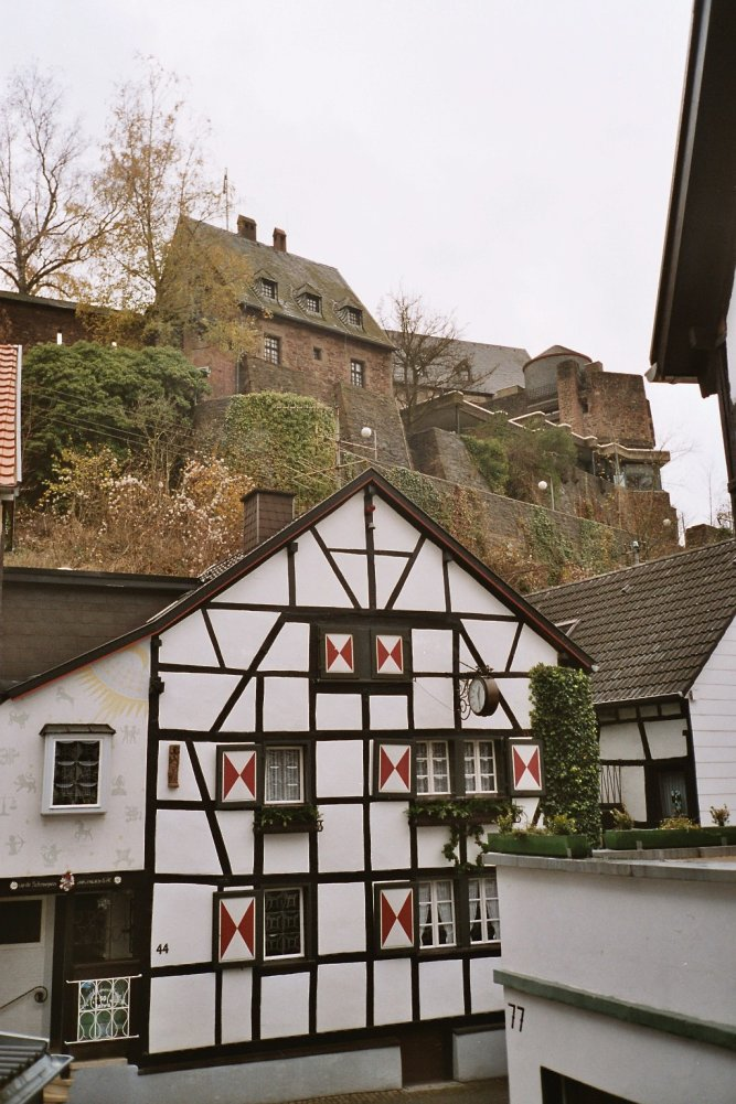 Die Heimbacher Burg, eigenes Bild